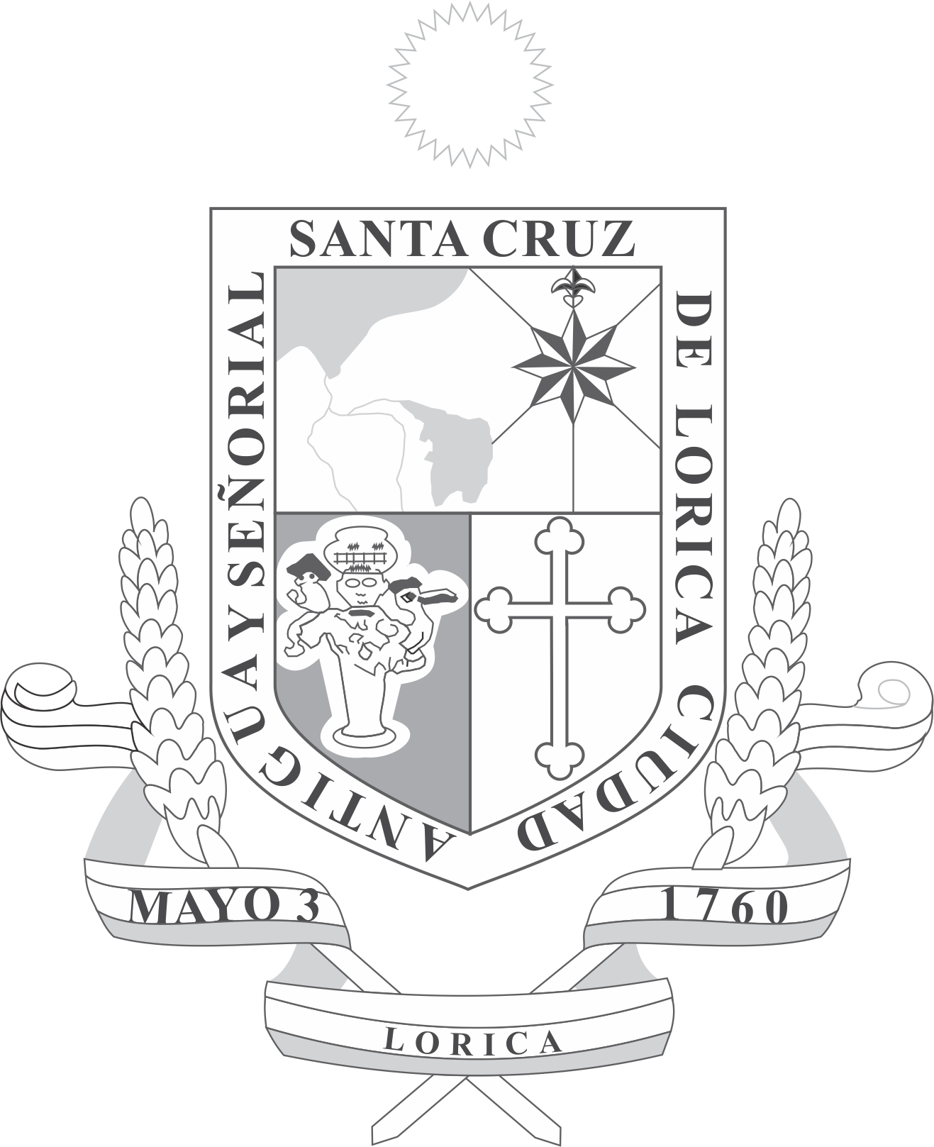 Escudo Santa Cruz de Lorica en escala de grises